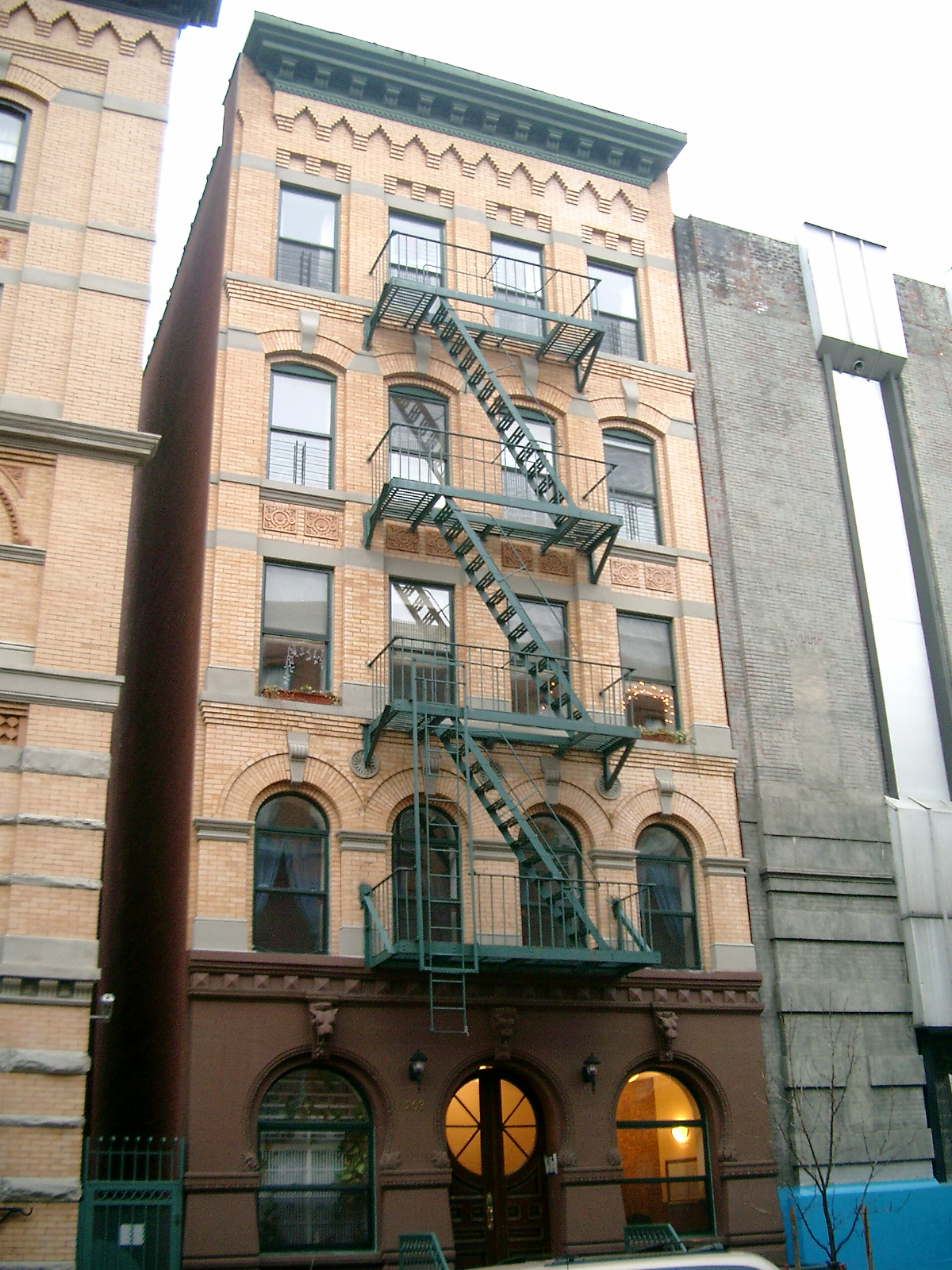 Fassade in Harlem. Eigene Aufnahme Januar 2004 Lechhansl